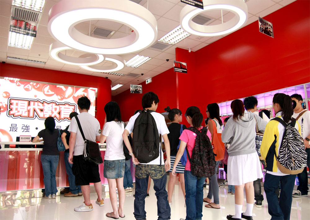 現代教育粉嶺分校